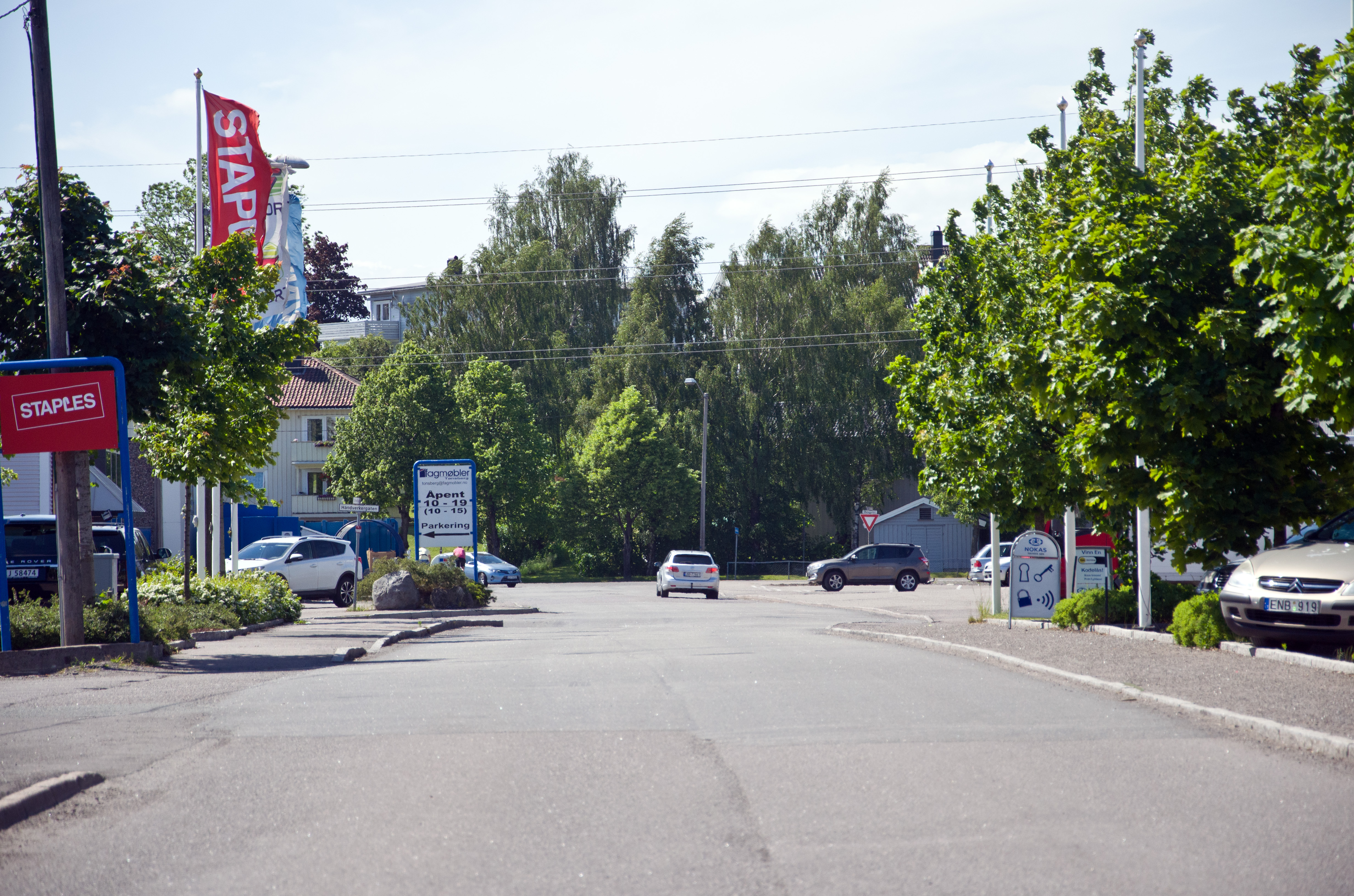 Industrigaten, Tønsberg